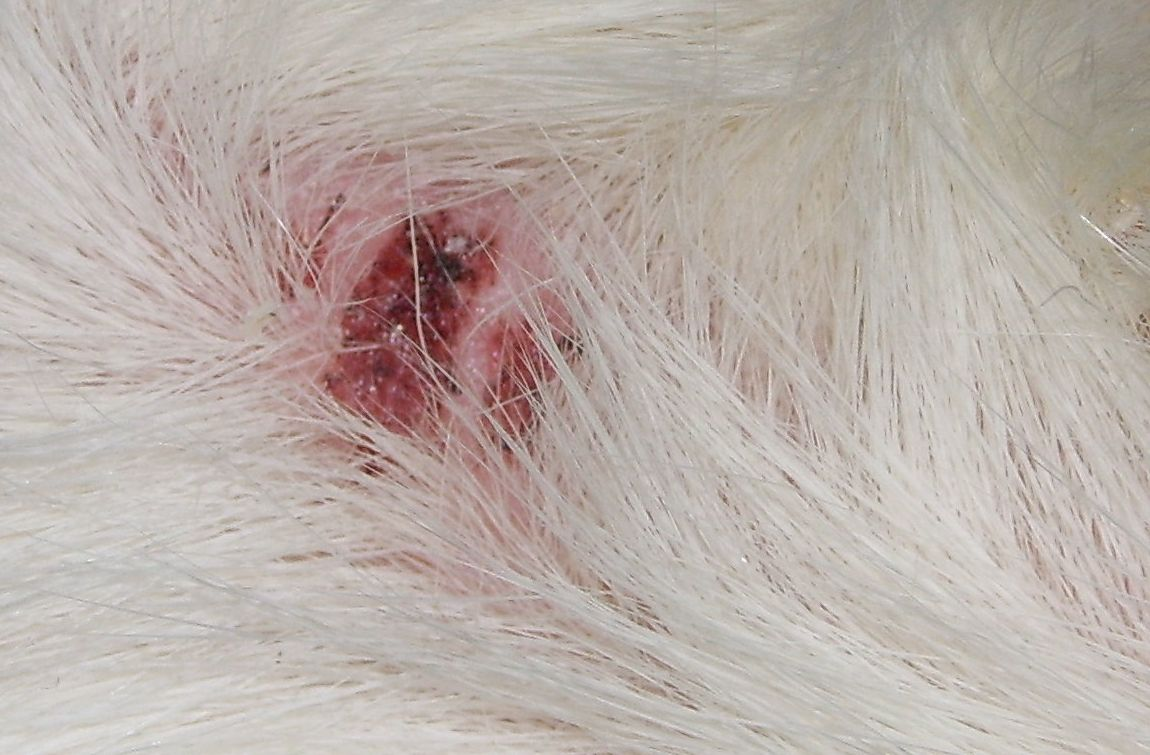 Trixacarus caviae infestion in a guinea pig